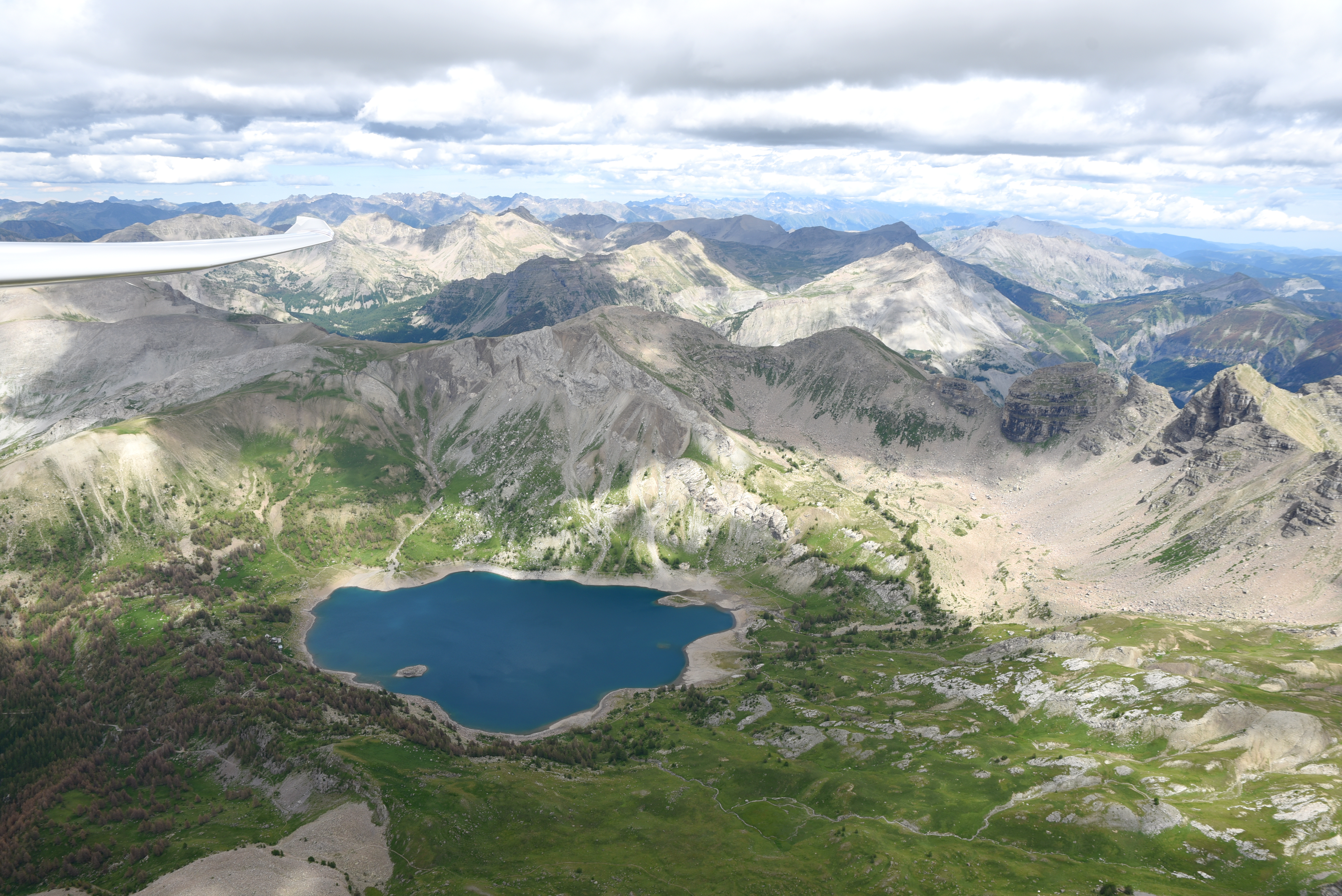 Lac d'Allos vom Segelflieger aus fotografiert